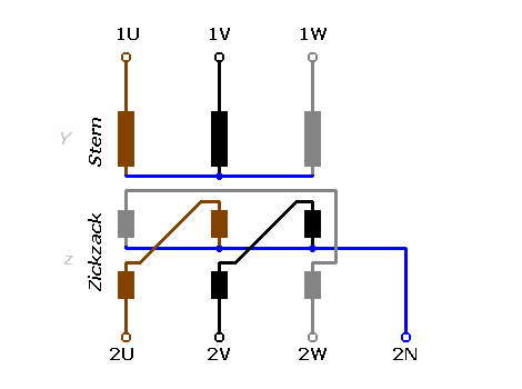 Schaltbild eines Stern-Zickzack-Trafos.